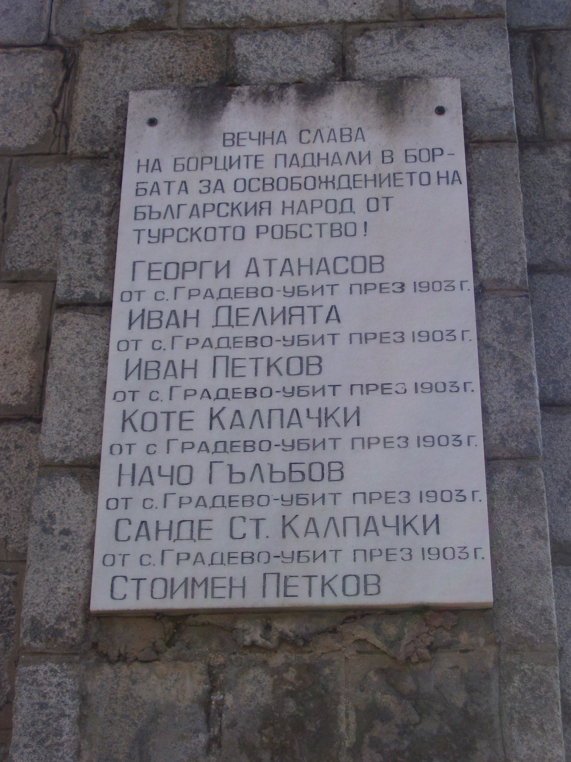 Паметна плоча в село Градево, област Благоевград, България.